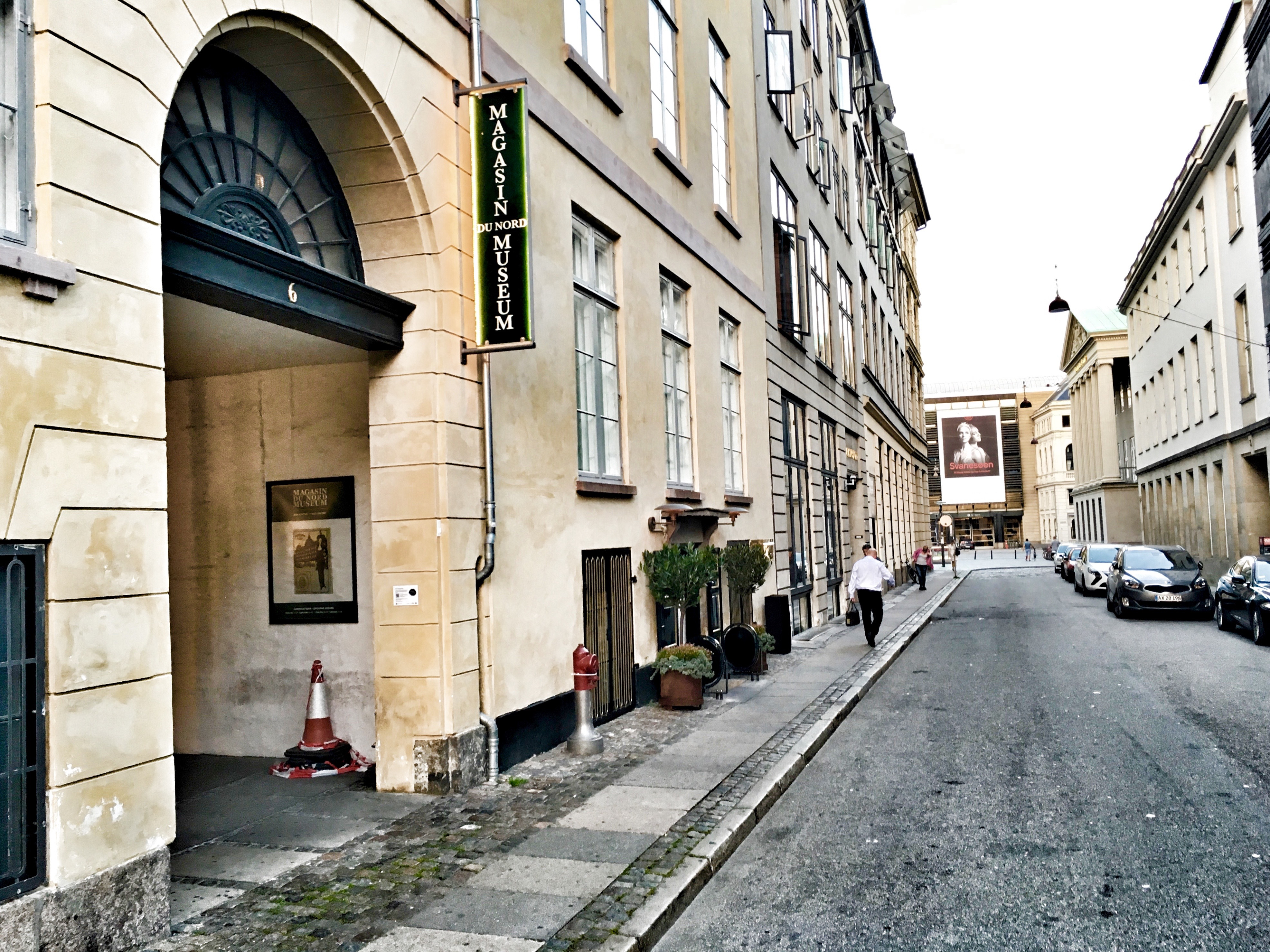 Magasin du Nord Museum, Vingårdstræde, København